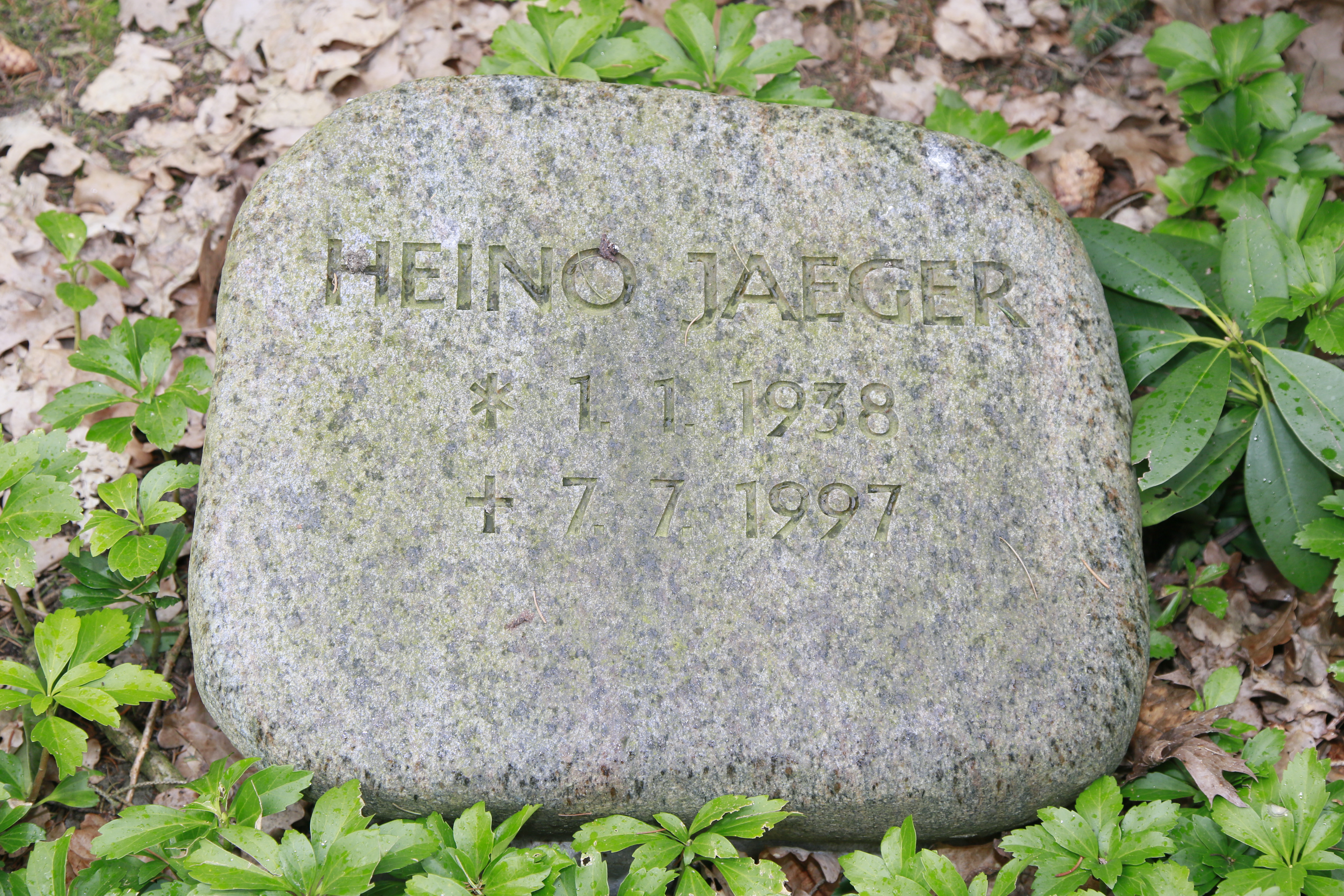 Heino Erik Jaeger (* 1. Januar 1938 in Hamburg-Harburg;[1] † 7. Juli 1997 in Bad Oldesloe; auch Jäger geschrieben) war ein deutscher Maler, Graphiker und Satiriker.